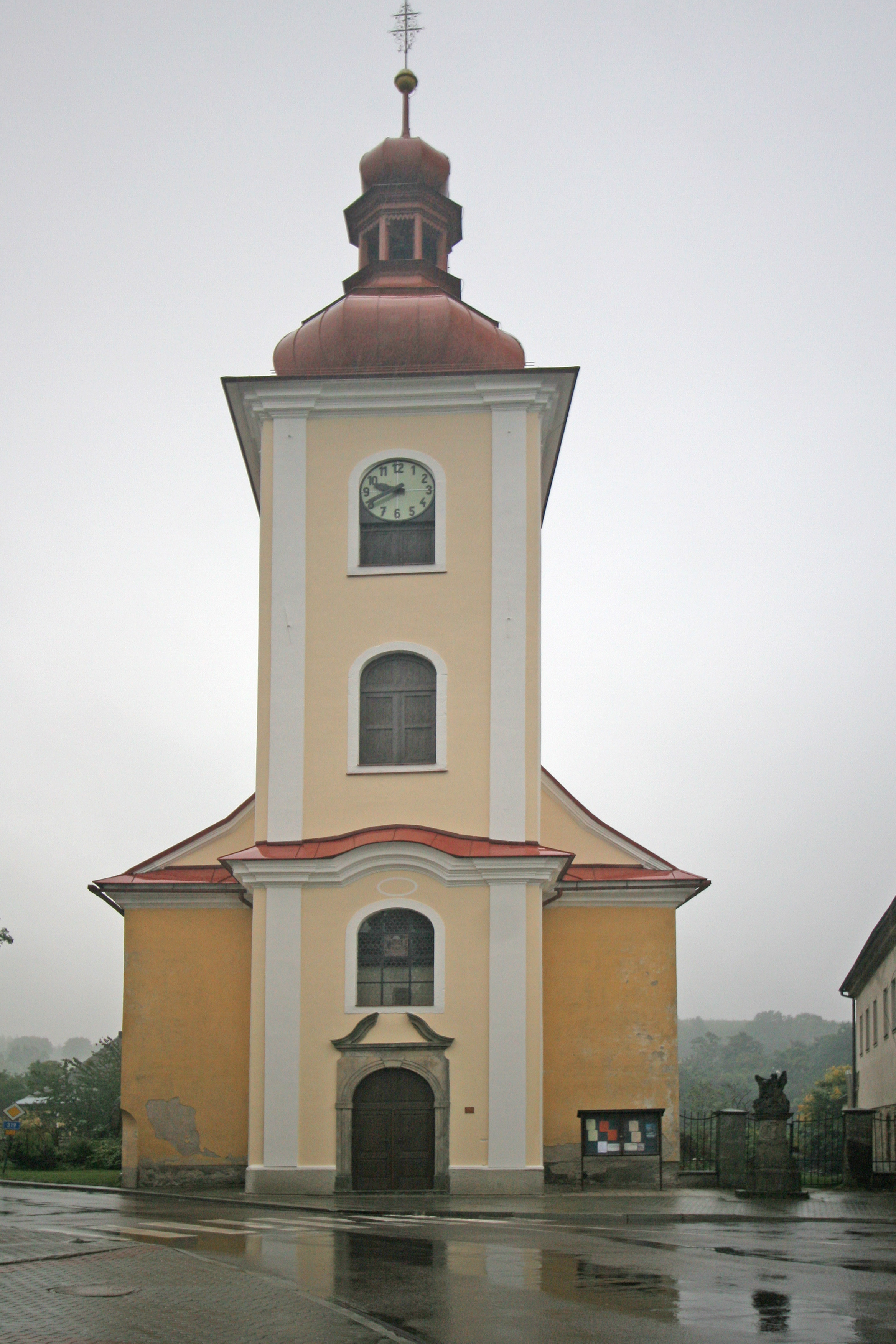 Kostel Všech svatých (Rokytnice v Orlických horách), Rokytnice v Orlických horách